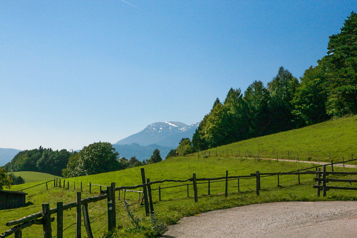 Payerbach, Sonnenpromenade, im Hintergrund der 2007 Meter hohe Gipfel der Rax